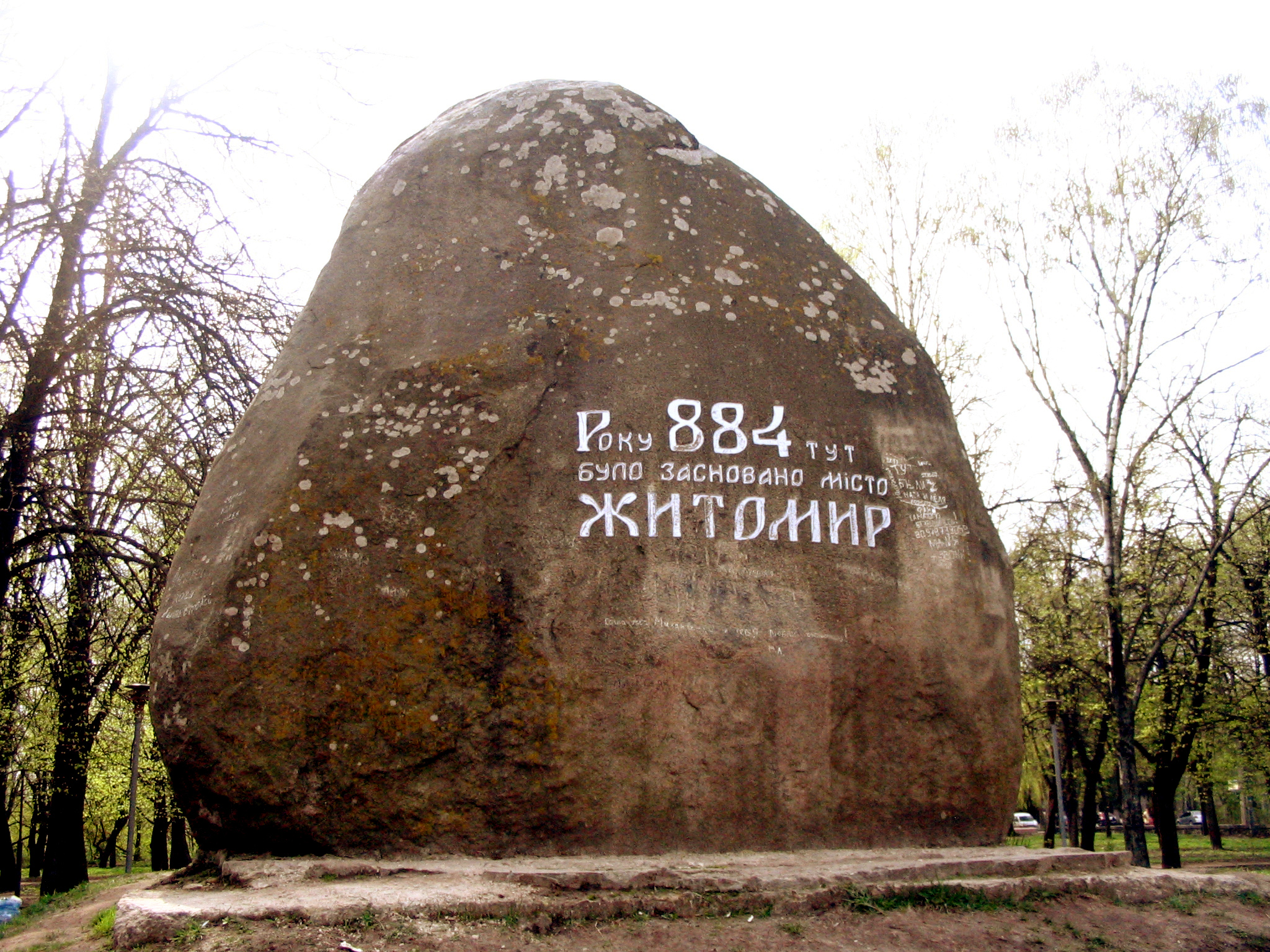 Камінь, встановлений на честь 1100-річчя з дня заснування м. Житомир, 09.1986